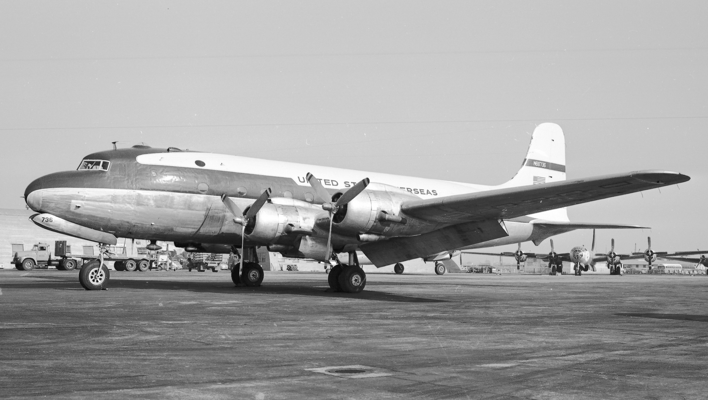 N68736 at Oakland in November 1952.